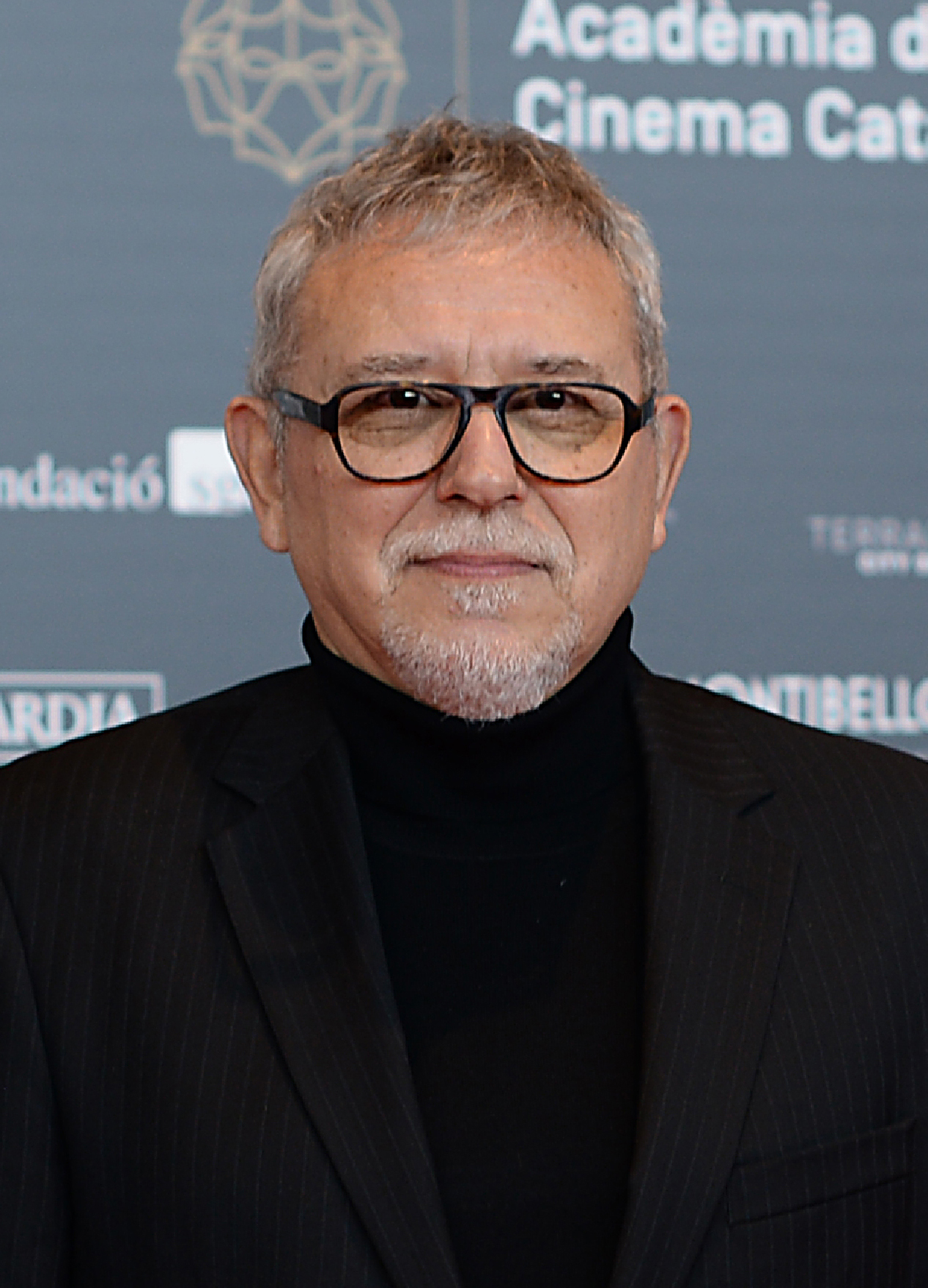 Jordi Frades, director de cinema, XII Premis Gaudí (2020)